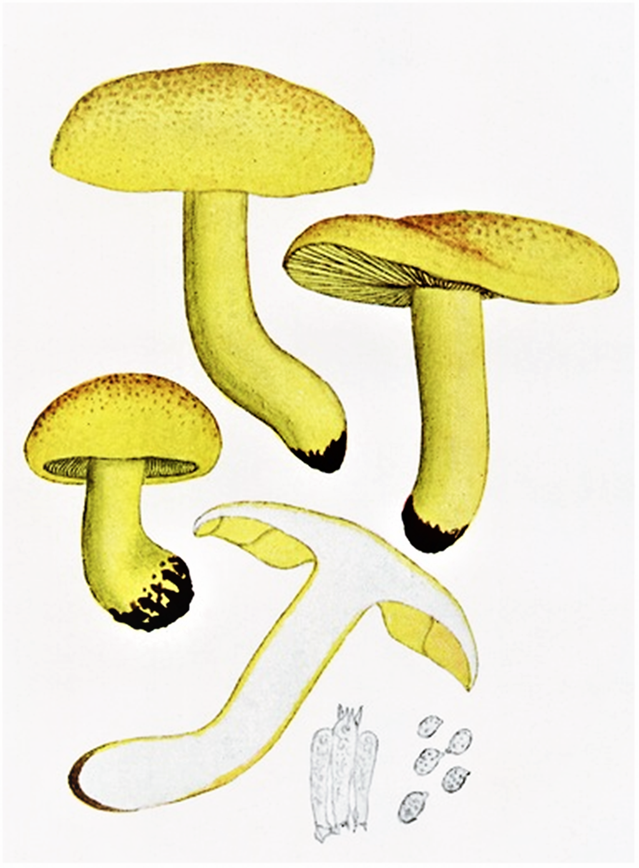 Giacomo Bresadola: Tricholoma equestre (L., 1753) P.Kumm. (1871)